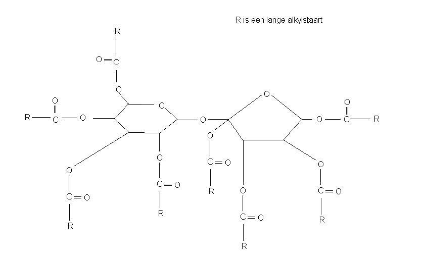 zelf gemaakt